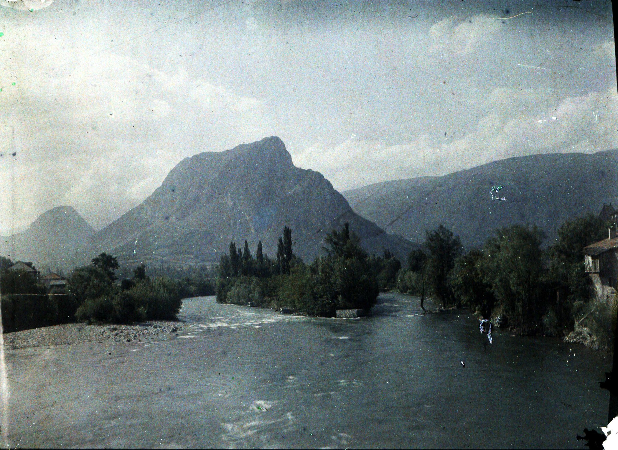 Fonds Trutat - Photographie ancienne Cote : TRU C 466 Localisation : Fonds ancien Original non communicable Auteur : Trutat, Eugène Rôle de l’auteur : Photographe Lieu de création : Tarascon-sur-Ariège (Ariège) Date de création : [ A partir de 1903 ] Mesures : 12 x 9 cm Mot(s)-clé(s) : -- Montagne -- Sommet (montagne) -- Cours d'eau -- Rivière -- Maison -- Végétation -- Arbre -- Ariège (Midi-Pyrénées) -- Tarascon-sur-Ariège (Ariège) Bibliothèque de Toulouse. Domaine public